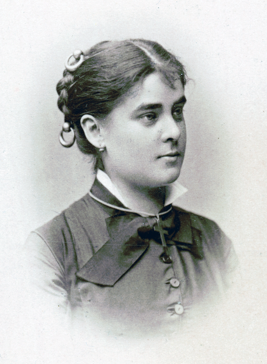 Louise Fahlman, skådespelare vid Nya teatern 1879